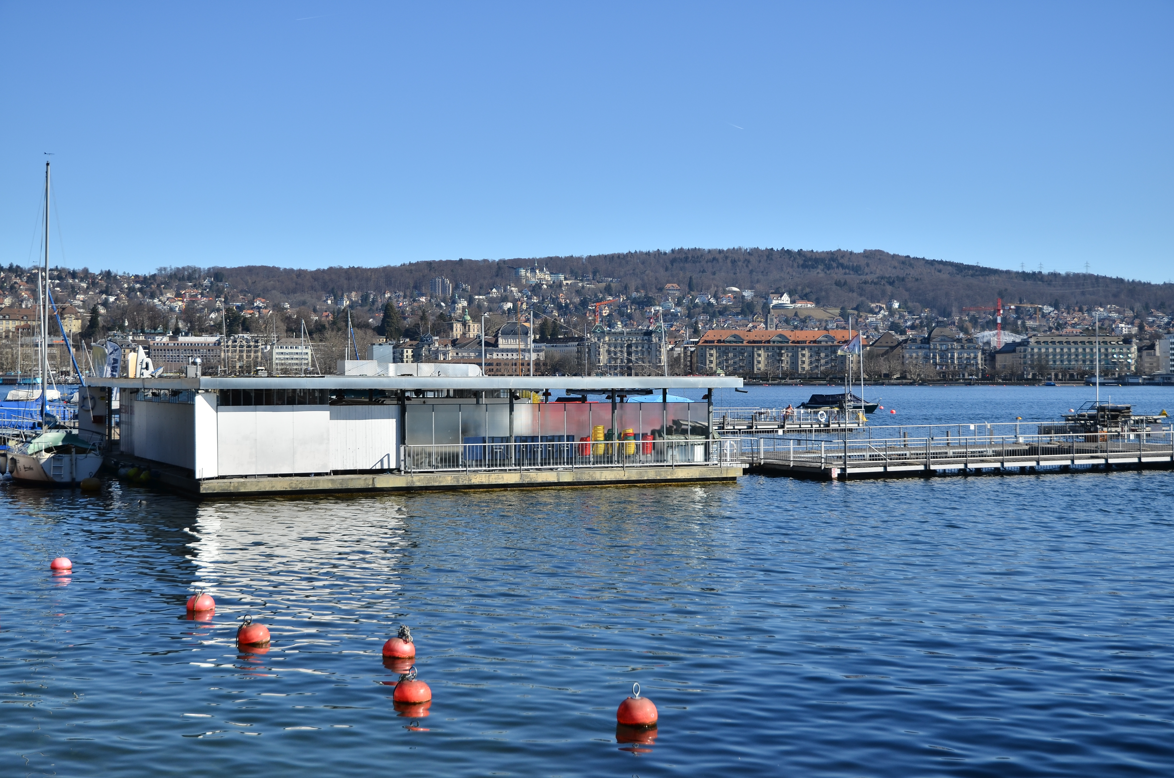 Adlisberg and Seebad Enge as seen from Arboretum in Zürich-Enge (Switzerland)